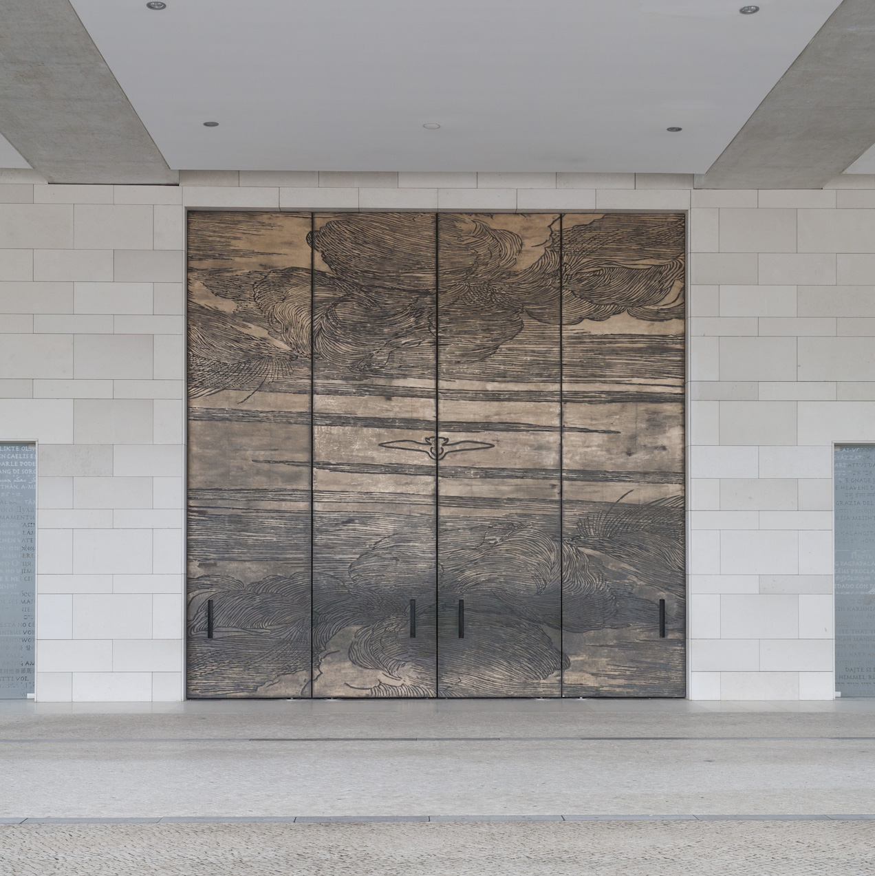 Obras de Pedro Calapez, Igreja da Santíssima Trindade, Fátima